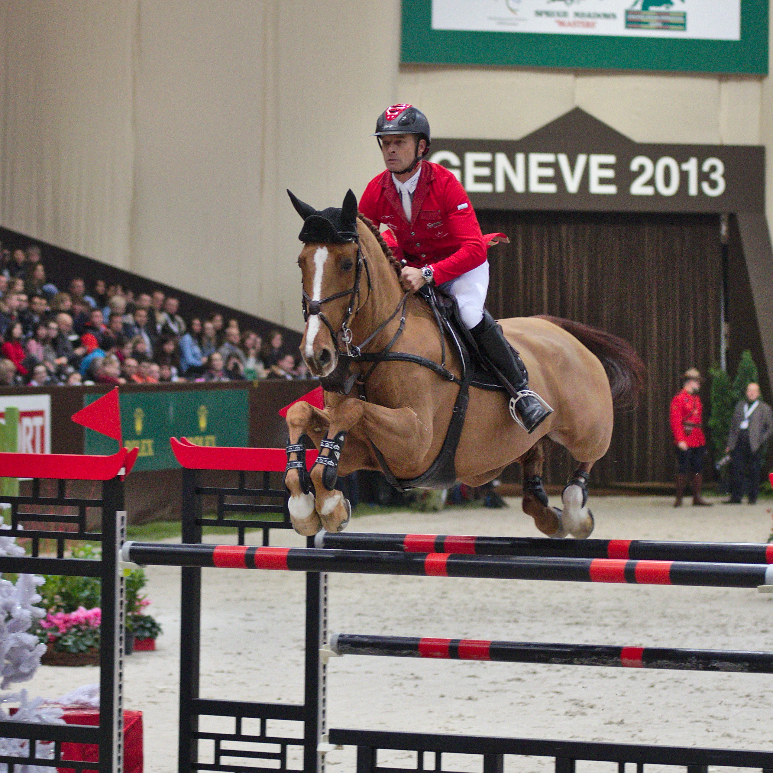 CHI Genève 2013 - 20131215 - Pius Schwizer et Picsou du Chene